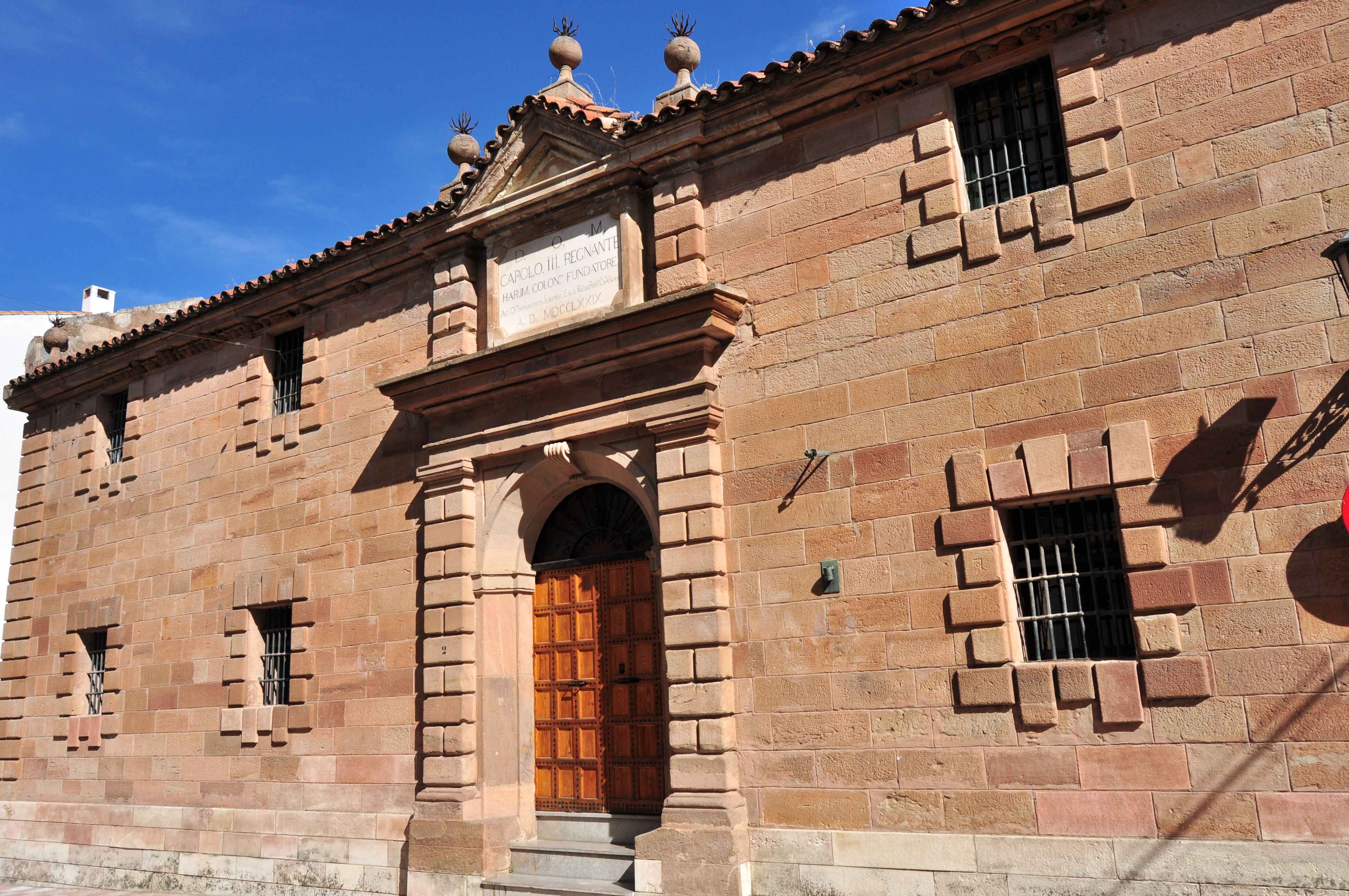 Antigua cárcel, La Carolina, Spain.